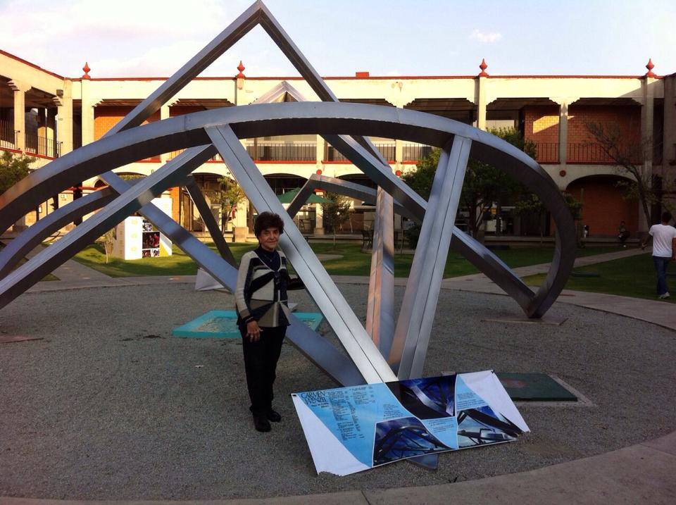 La artista Carmen Wenzel junto a su obra "Encuentro cósmico" ubicada en el campus de la Universidad de las Américas Puebla, en San Andrés Cholula, México.